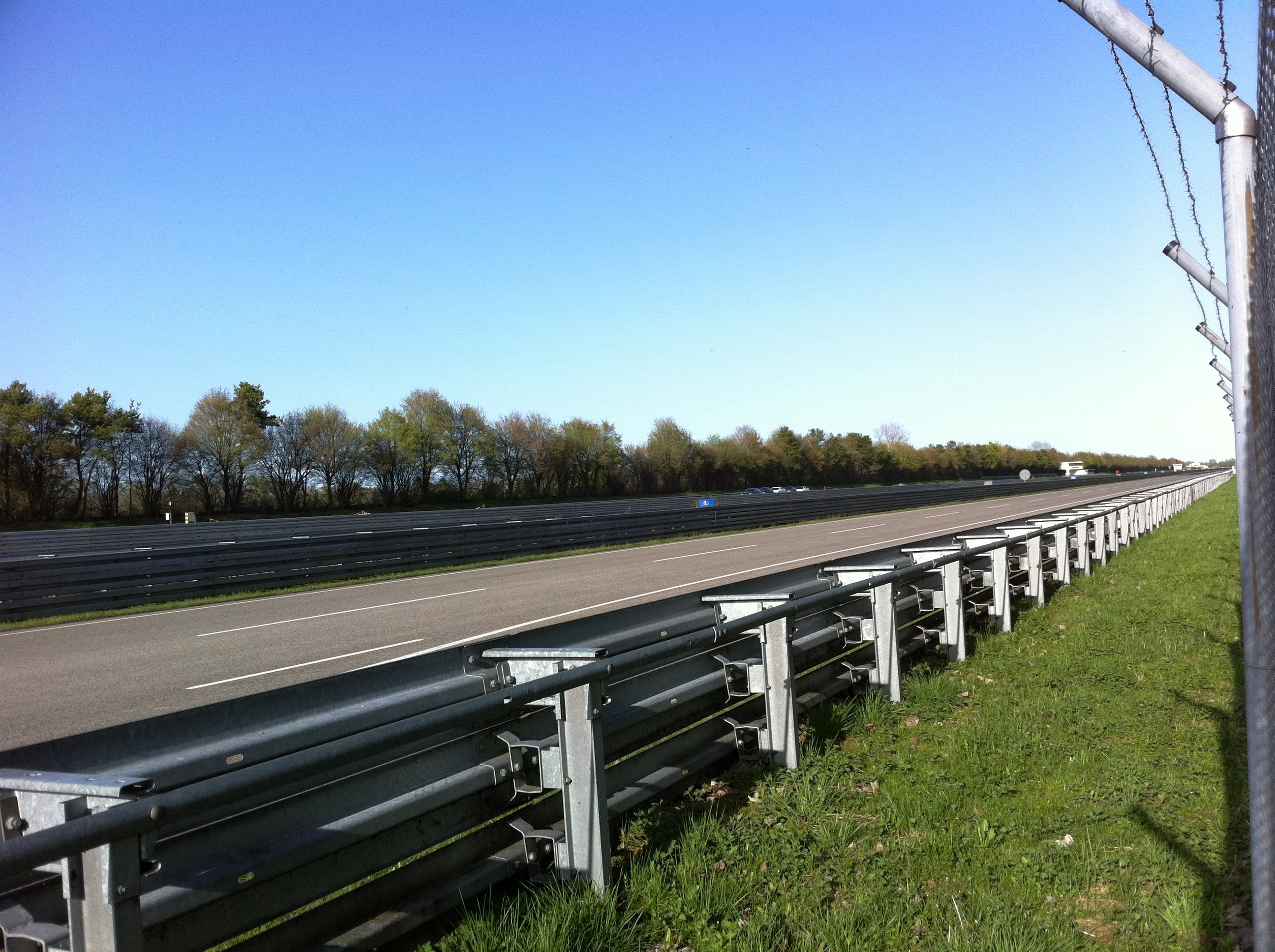 BMW-Messgelände Aschheim am Ismaninger Speichersee, Landkreis München, Bayern